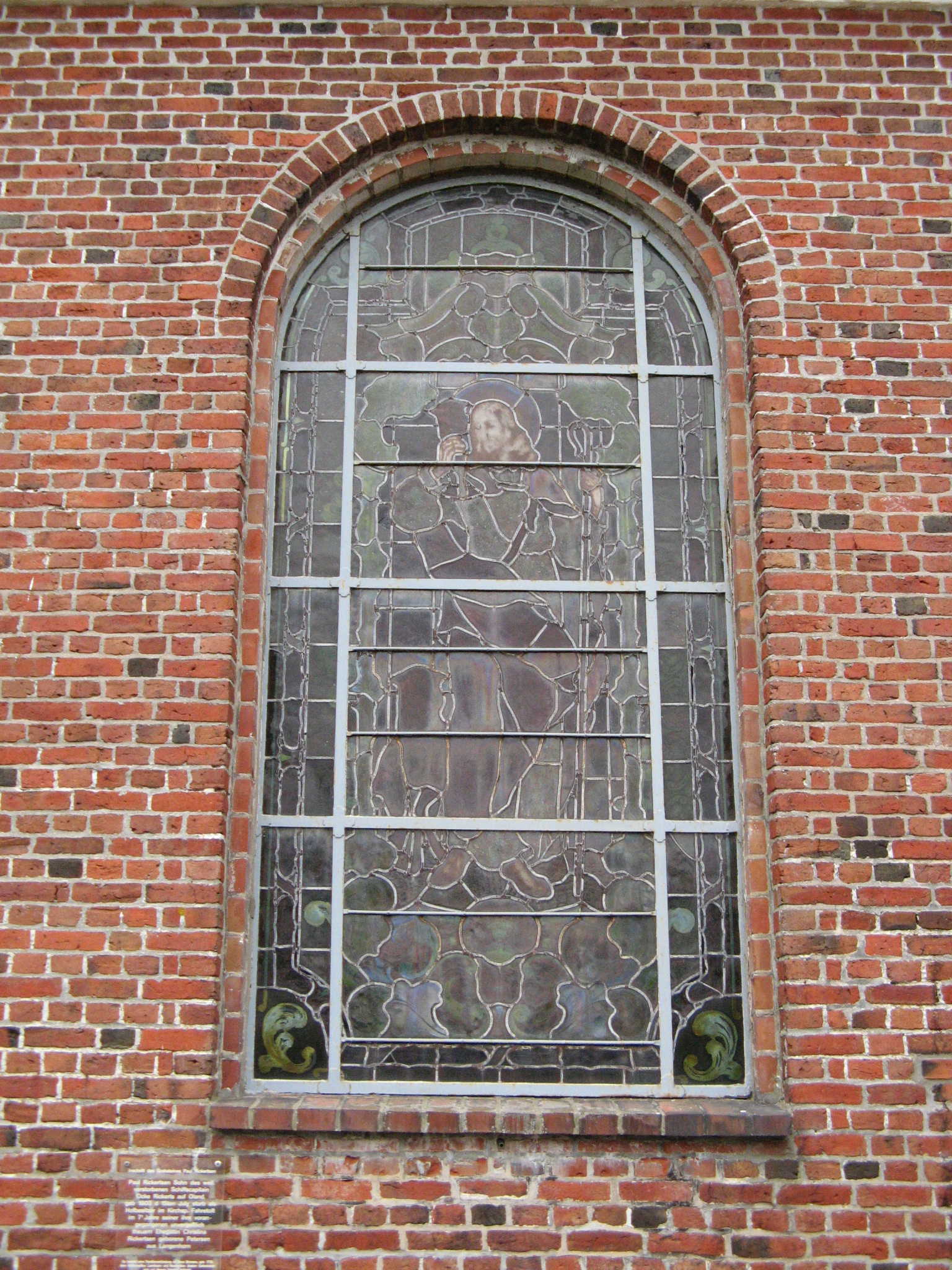 Church in Fahretoft. Author: Dirk Ingo Franke